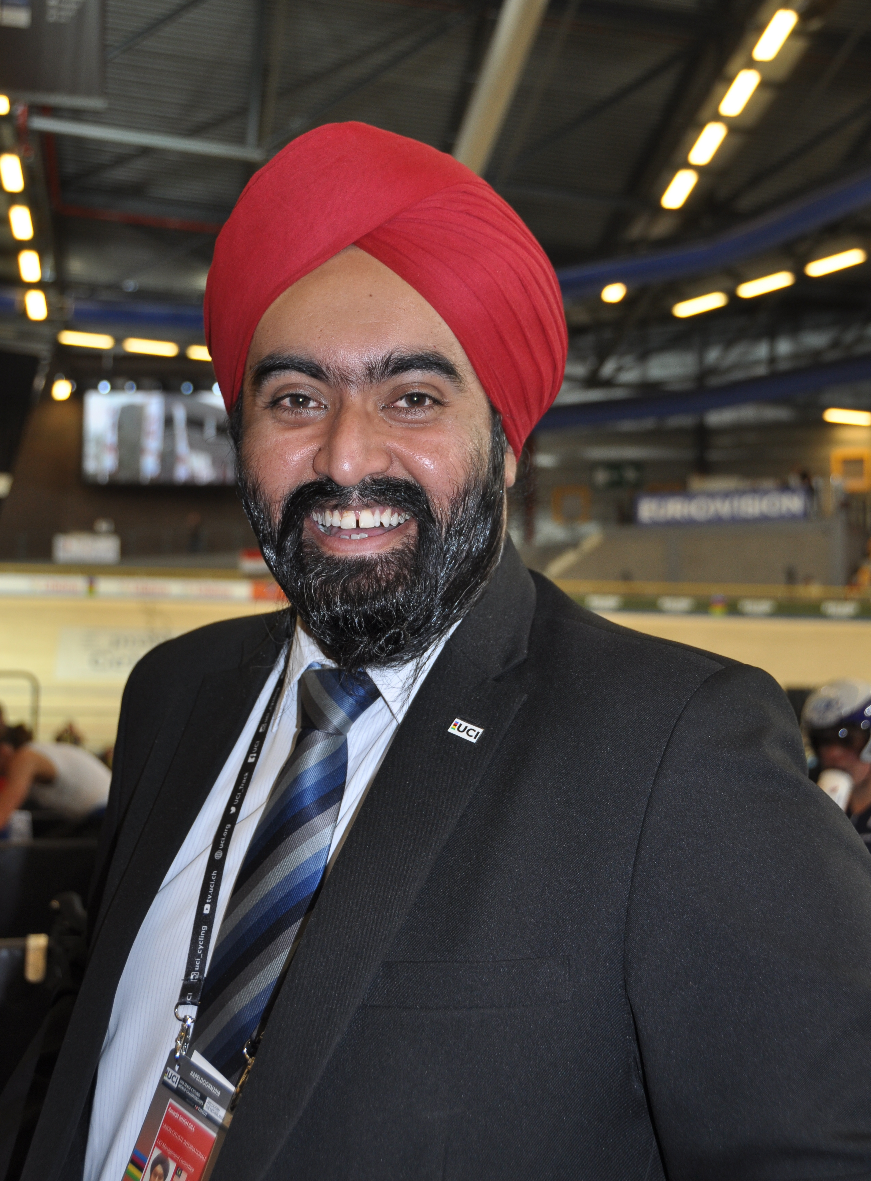 Dato Amarjit Singh Gill, malaysisches Mitglied des UCI-Management Boards